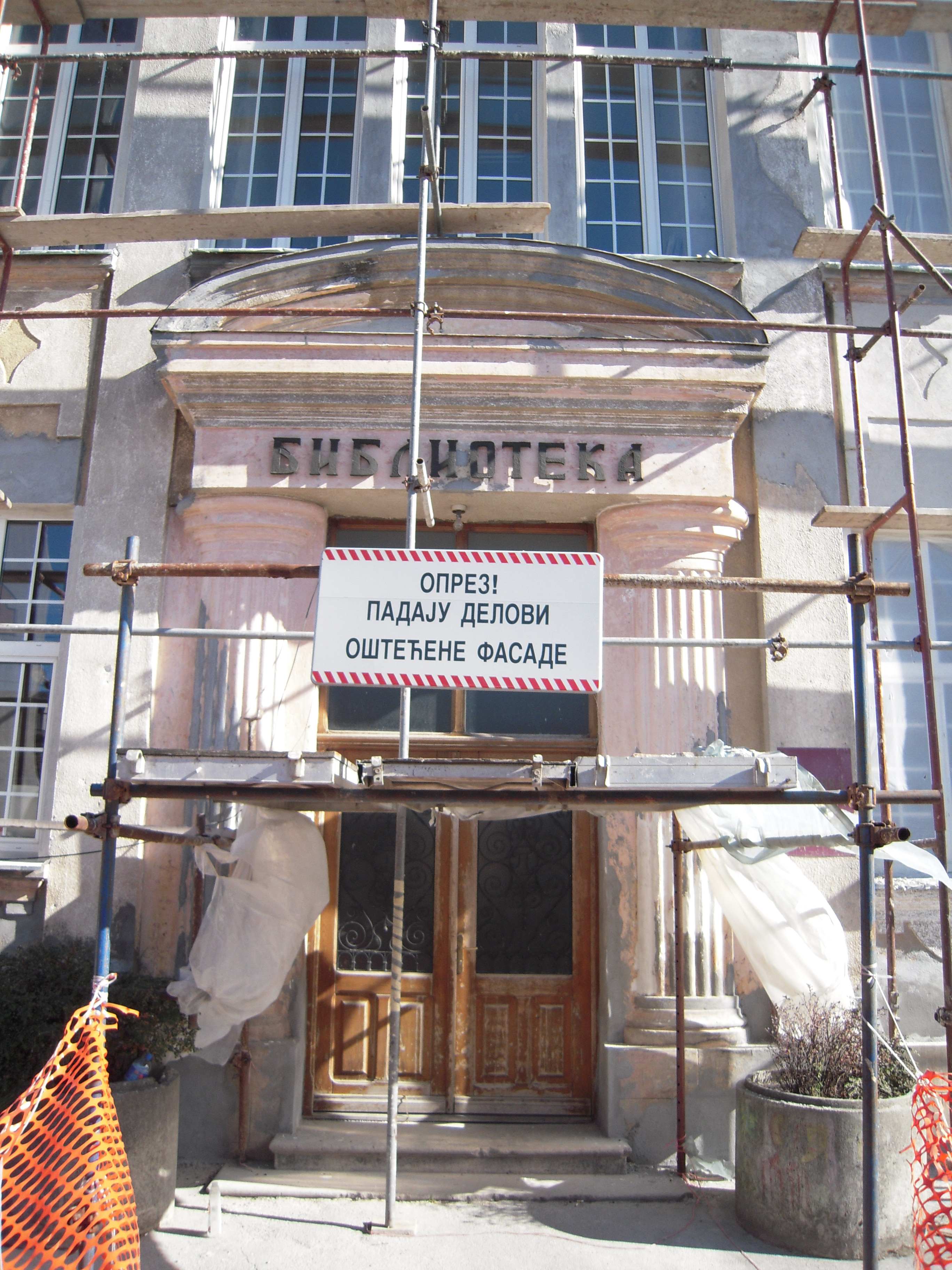 Зграда у Ул. Бранка Крсмановића 47 у Параћину